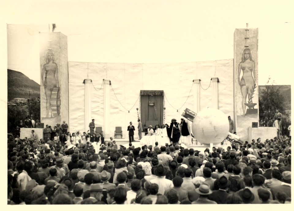 Primer escenario de la Fiesta Nacional del Petróleo, Comodoro Rivadavia